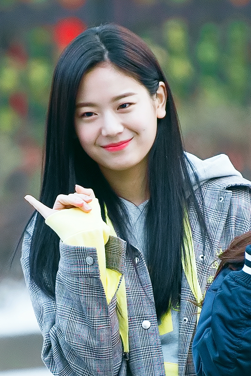 180223 뮤직뱅크 프로미스나인 직찍